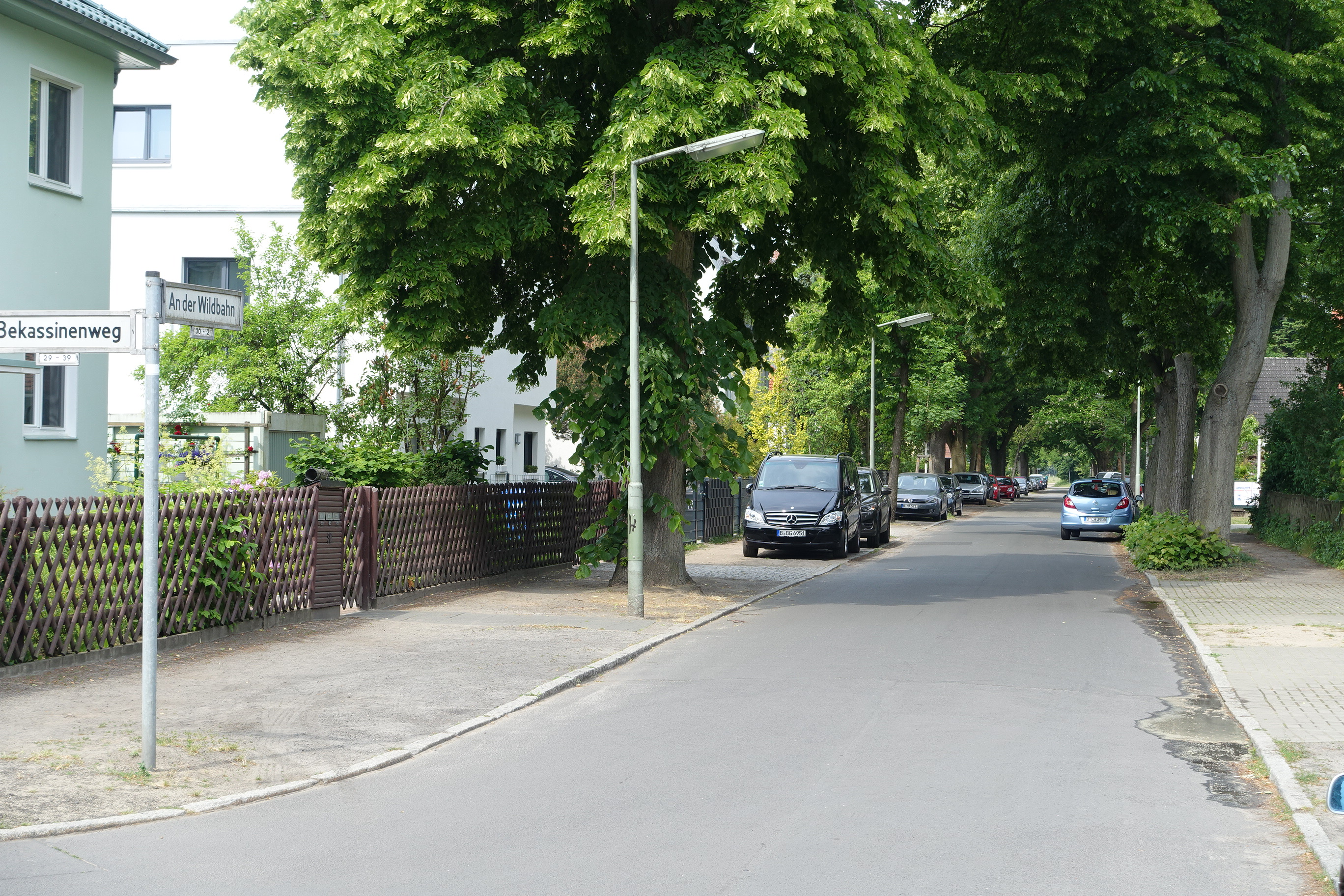 Straßenpanorama